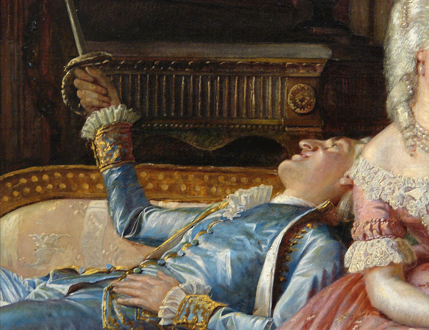 P.H. Kristian Zahrtmann, Scene fra Christian VII's hof, detalje, 1873 -. Hirschsprungske Samling, København